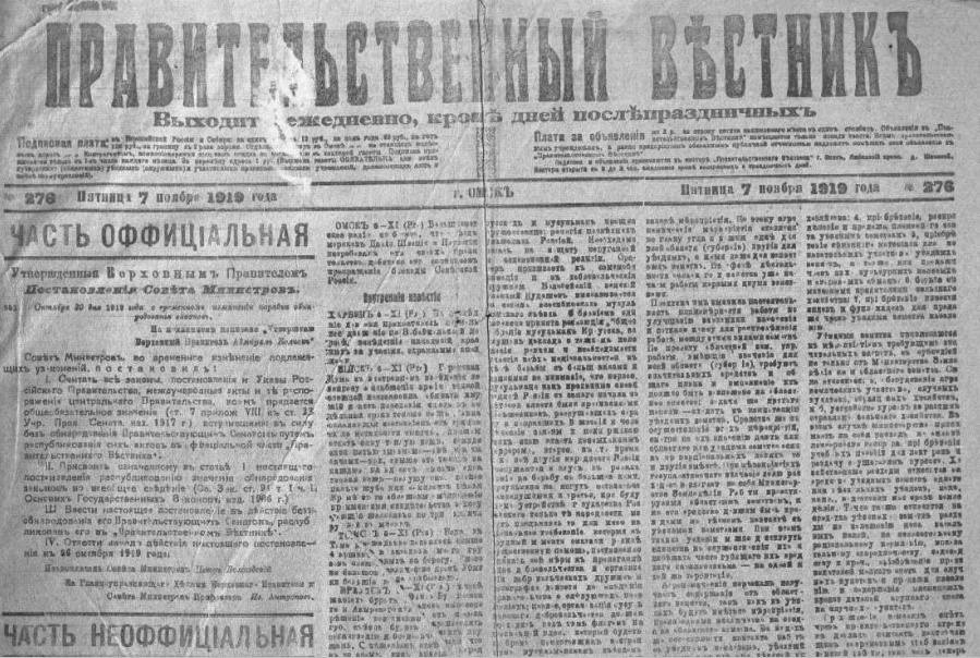 Фрагмент титульного листа газеты "Правительственный вестник"